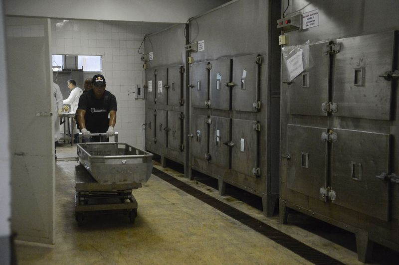 "Corpos chegam ao Departamento Médico Legal (DML) de Vitória que chegou a ser fechado ontem (07)"